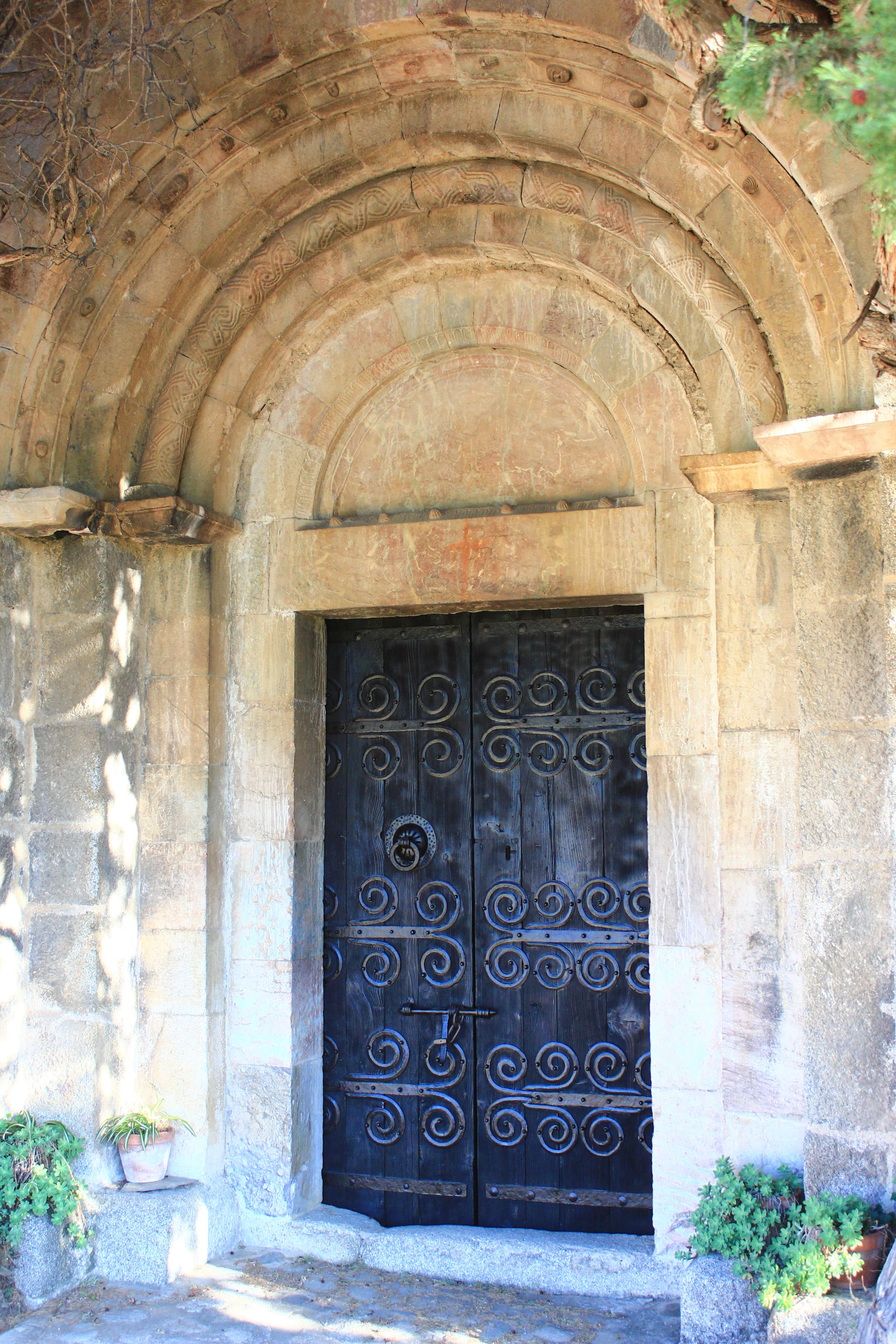 Eus (66) Un des plus beaux villages de France. L'ancienne église paroissiale Saint-Etienne et Saint-Vincent (église du bas); portail sud roman